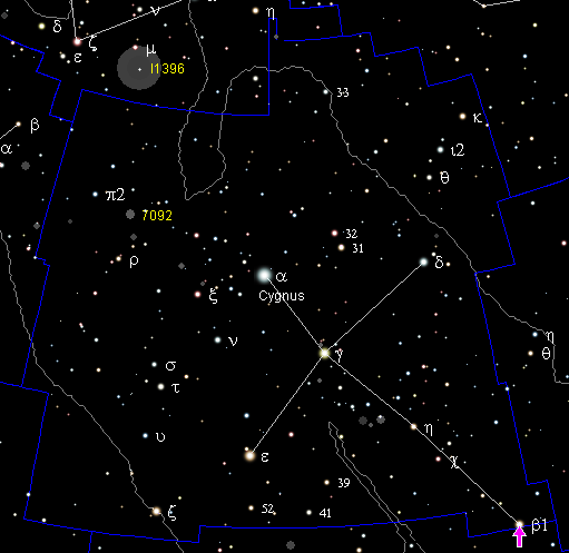 Posición de Albireo Position of Beta Cygni, also known as Albireo. The cross-shaped constellation is the Northern Cross. The blue line shows the boundary of the constellation the Swan (also known as cygnus). By Zwergelstern Thanks for the help of Patrick Chevalley